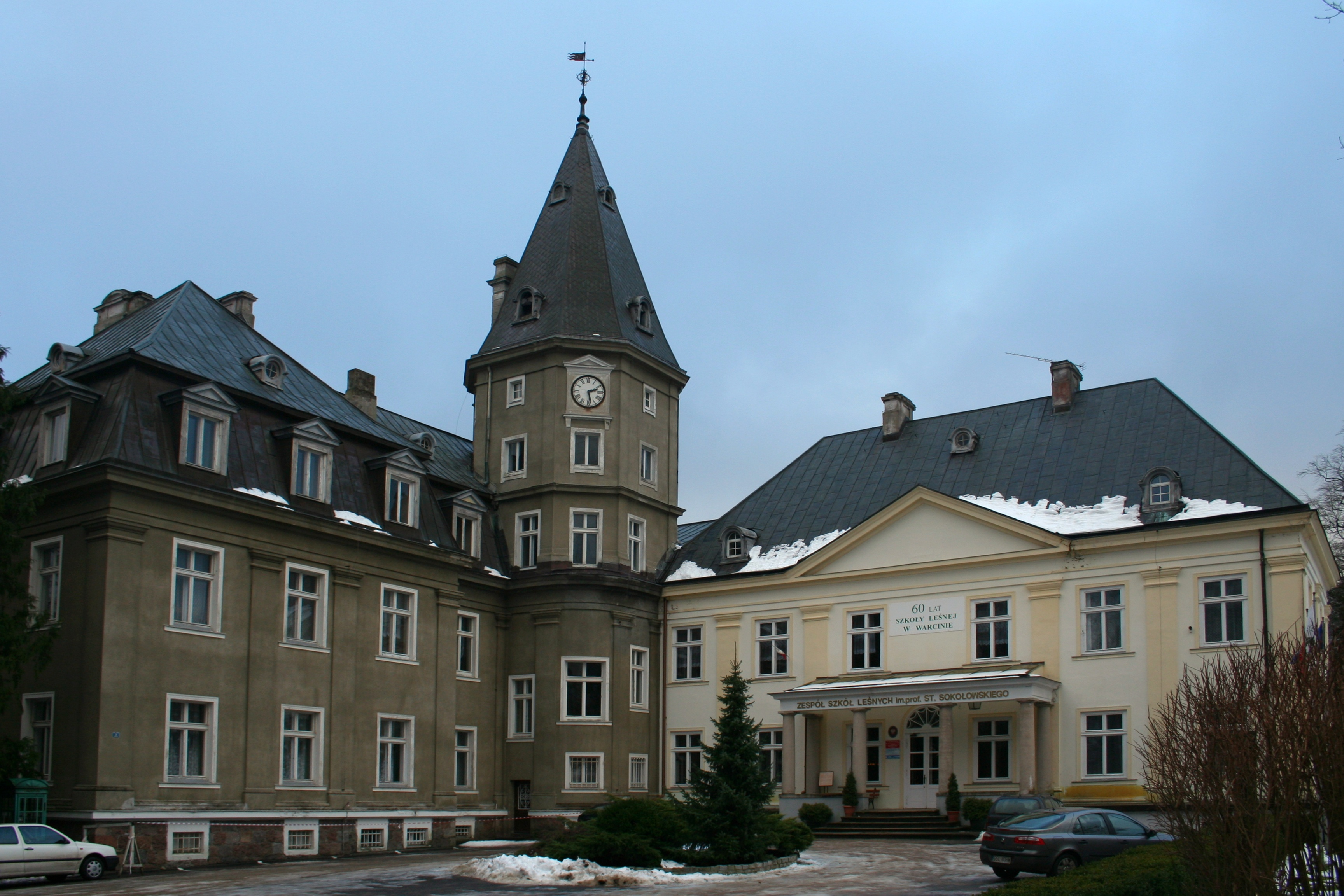 Warcino pałacyk Bismarcka